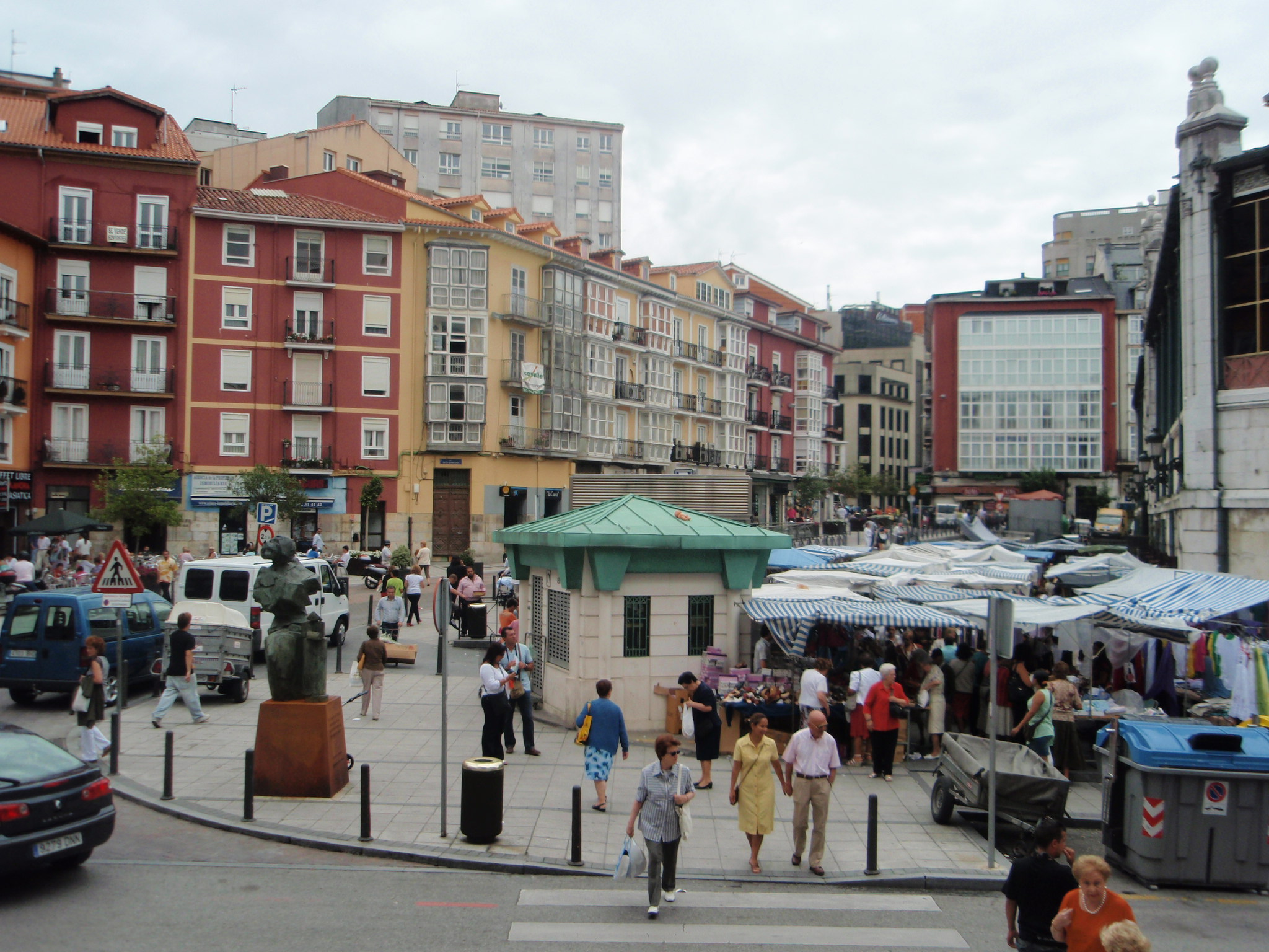 Mercado de Buena Esperanza en Santander, España.